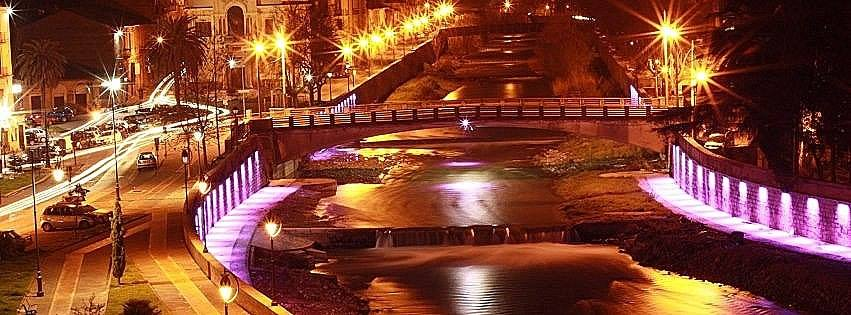 Uno scorcio notturno della città antica di Cosenza alla confluenza dei fiumi Crati e Busento.